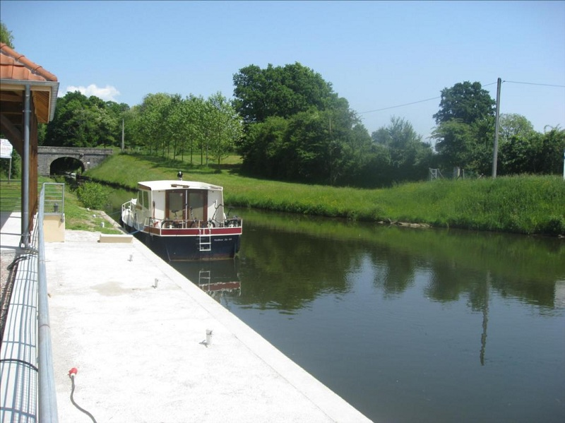 Le port des Pougeats, à Bazolles